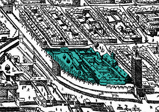 Ausschnitt aus dem Sickingerplan: Freiburg im Breisgau, Vogelschauplan von Nordwesten